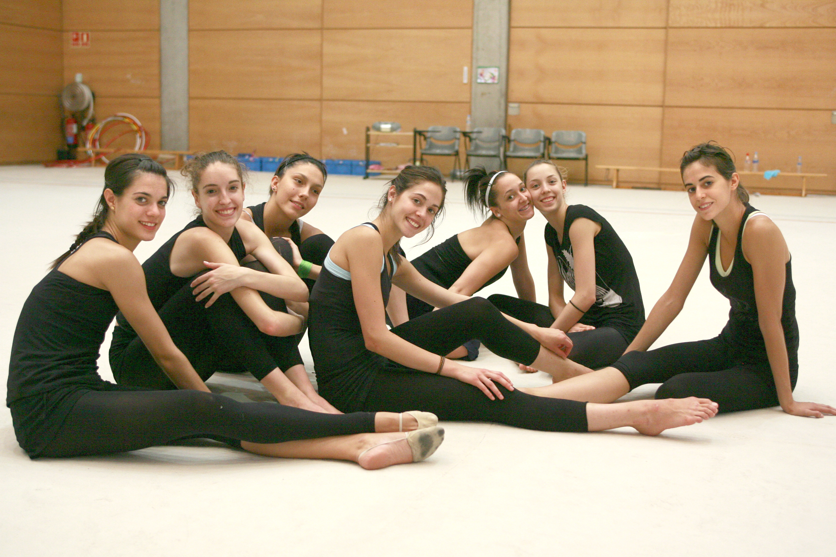 El conjunto español de gimnasia rítmica en el CAR de Madrid en el año 2007. De izquierda a derecha: Bet Salom, Verónica Ruiz, Cristina Dassaeva, Bárbara González, Isabel Pagán, Ana María Pelaz y Lara González.